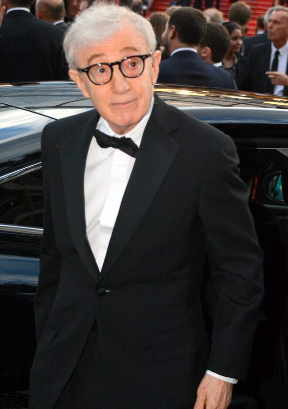 Woody Allen au festival de Cannes